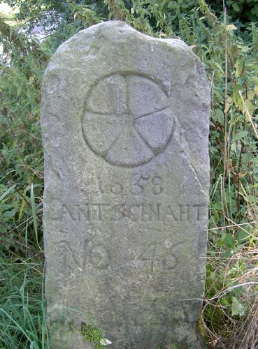 Grenzstein No. 46 mit der lippischen Rose und der Aufschrift „Lantschnaht“ aus dem Jahre 1658. Siehe Lippspringischer Originalvergleich.